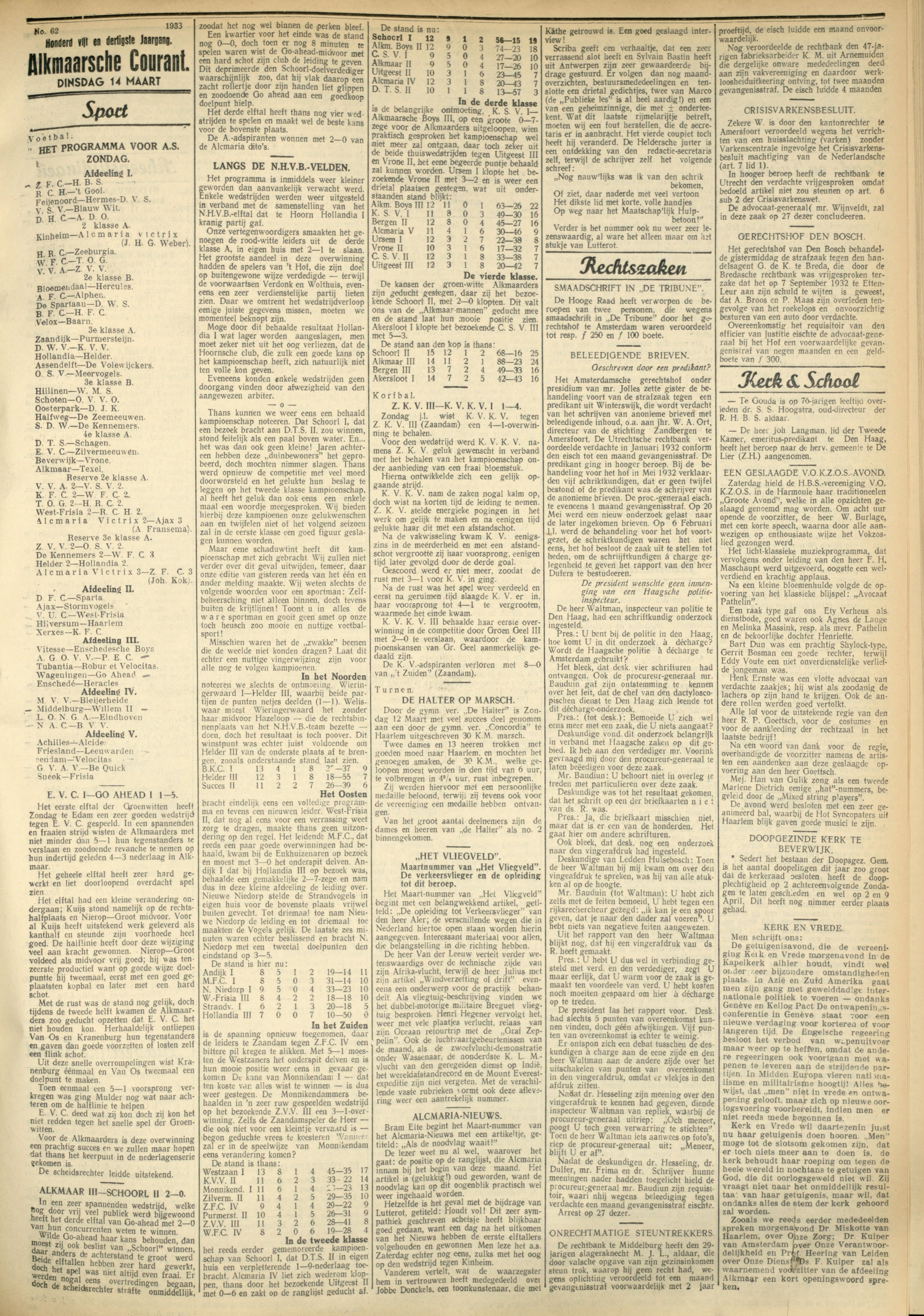 Schoorl Kampioen